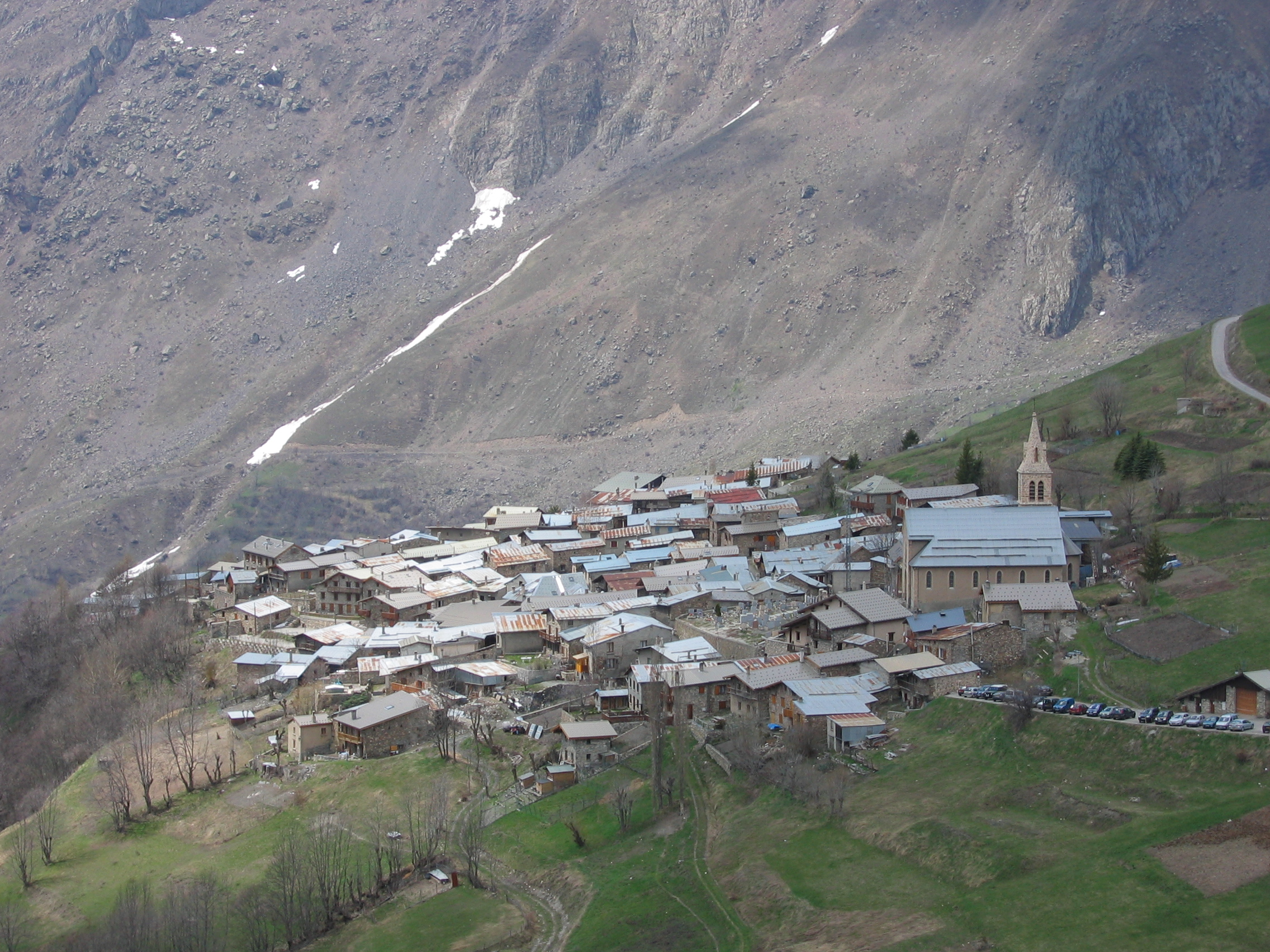 Besse-en-Oisans